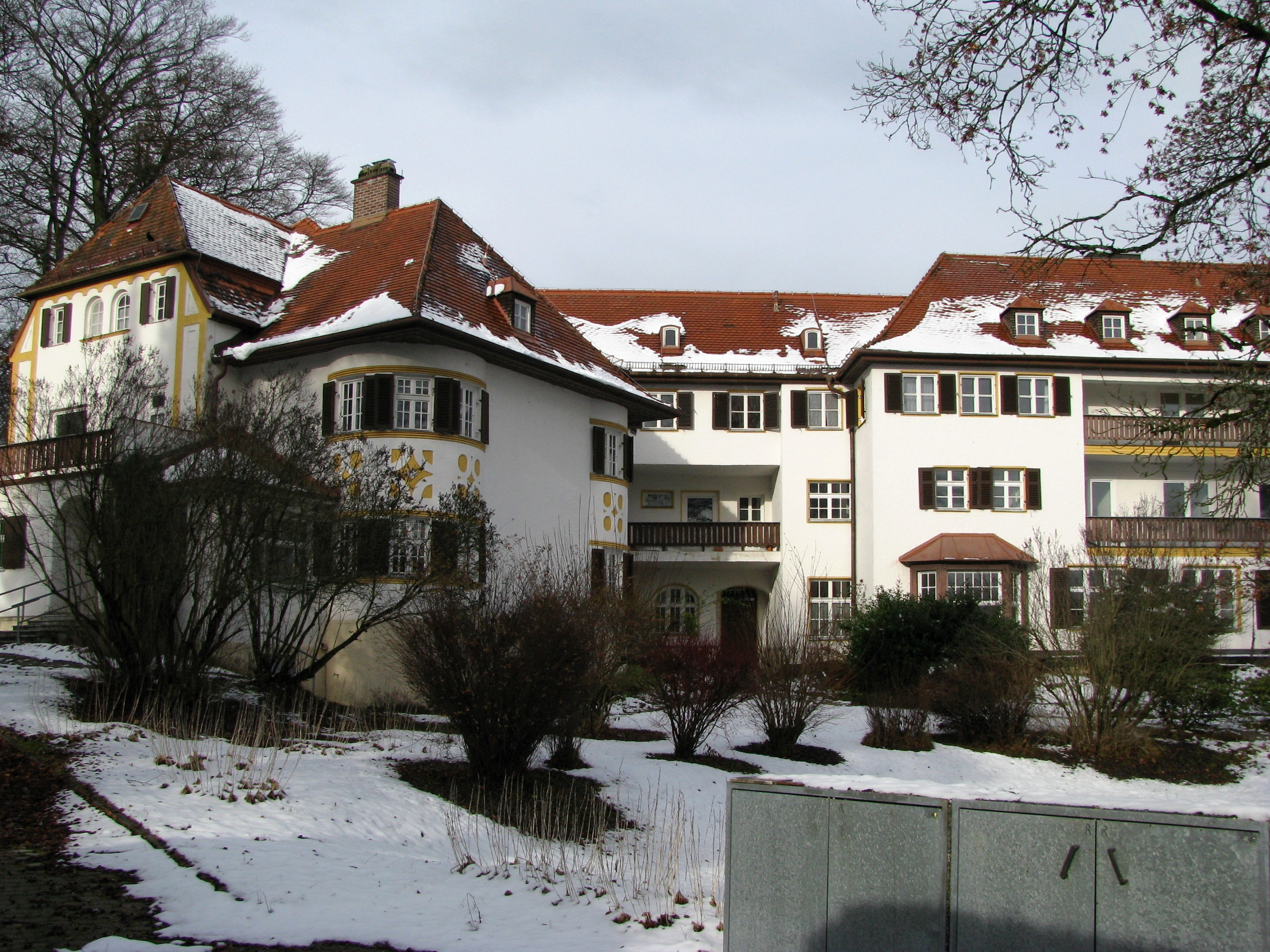 Ehem. Kindersanatorium in Zell, Gemeinde Schäftlarn; Südostansicht